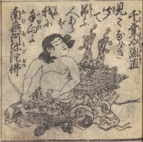 千葉胤直